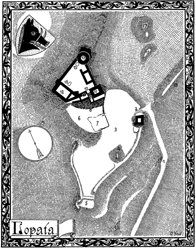 Lopata – půdorys hradu od Vojtěcha Krále z Dobré Vody publikovaný roku 1905; popis: 1 – cesta, 2 – brána se sousední věží, 3 – předhradí, 4 – jáma, 5 – dřevěný srub, 6 – vyšší část předhradí, 7 – věž, 8 – příkop, 9 – přední brána, 10 – zadní brána, 11 – věž k ochraně brány, 12 – palác, 13 – velká věž, 14 – podezdívka věže, 15 – pec, 16 – cisterna, 17 – jámy, 18 – val